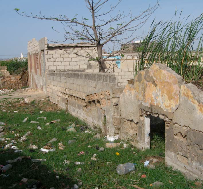 Concession remblayé, Pikine, Dakar